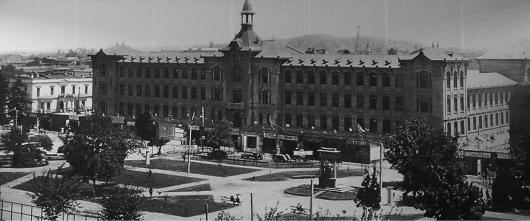 Edificio del Liceo EMG de Concepcion, frente al actual parque Ecuador